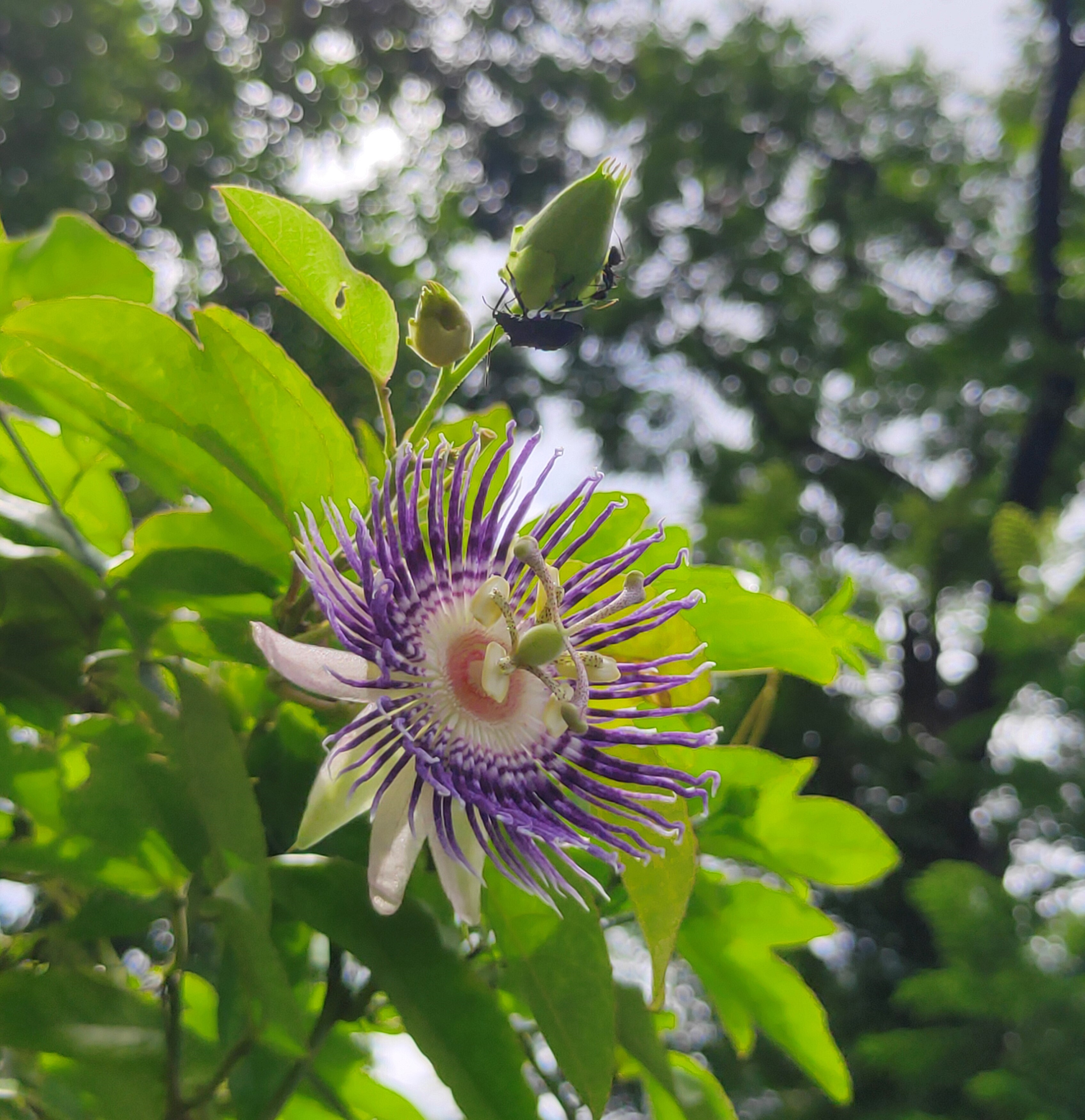 पॅसिफ्लोरा "सोइ फा" वेल